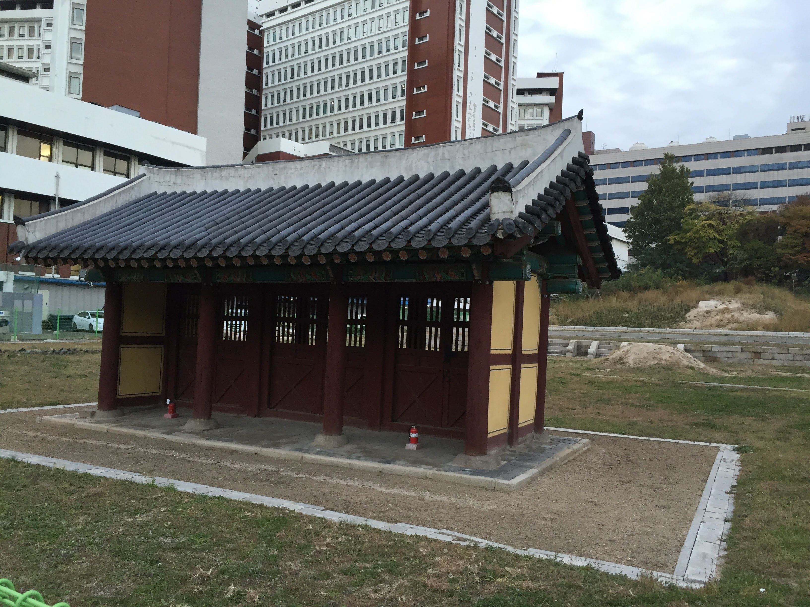 함춘문 (사적 제237호 서울 경모궁지)